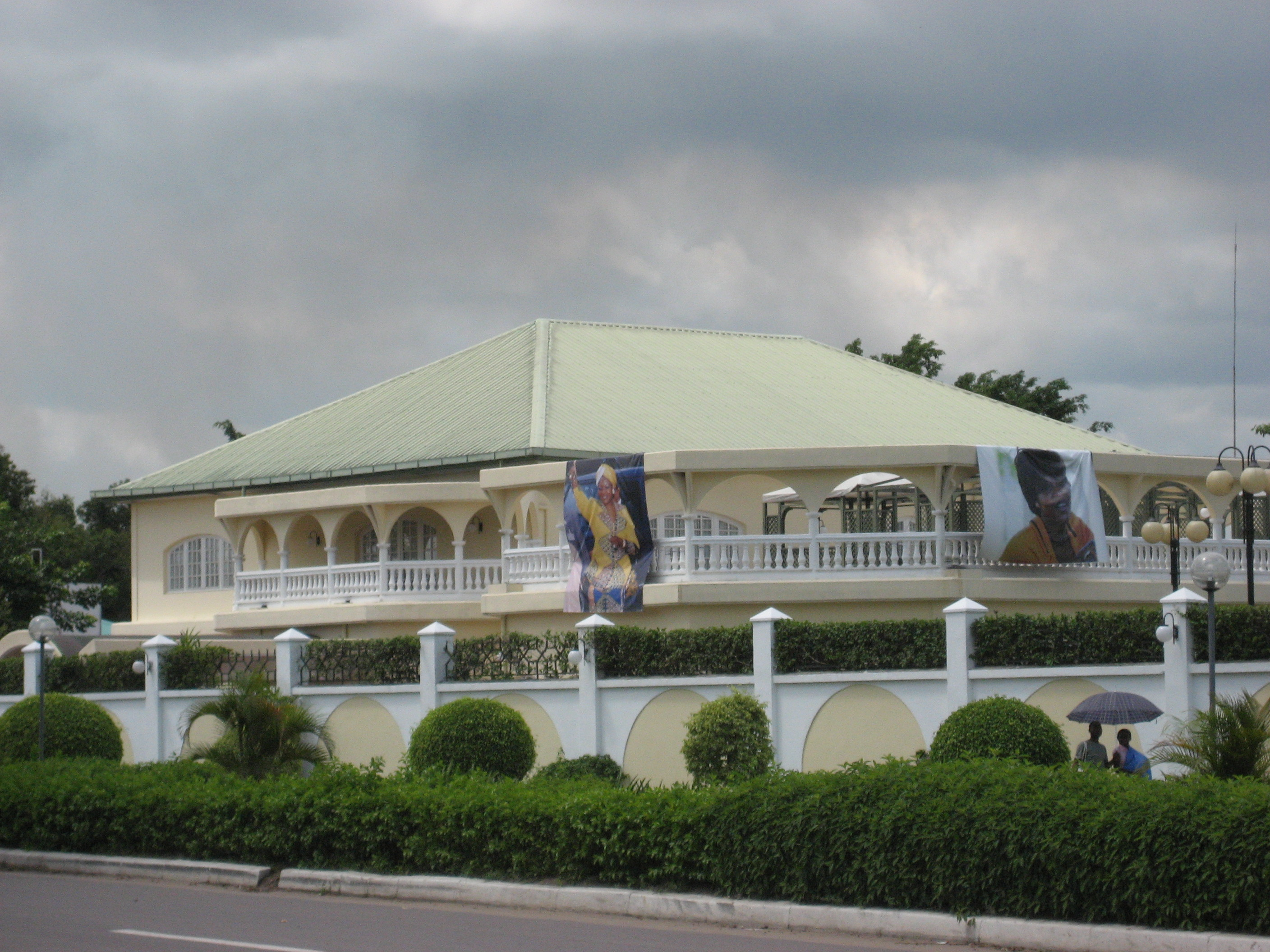 Une des villas de la famille Sassou à Oyo, Cuvette centrale, Rép. du Congo, arborant des portraits d'Edith Bongo à l'occasion de son décès.